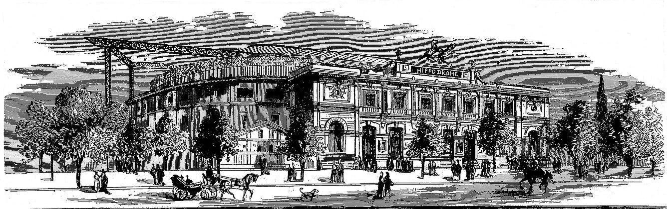 L'extérieure de l'hippodrome parisien du pont de l'Alma inauguré en 1878.